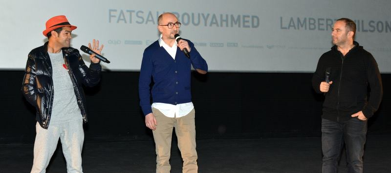 Jamel Debbouze, Fatsah Bouyahmed et Mohamed Hamidi à l'avant-première du film "La Vache"